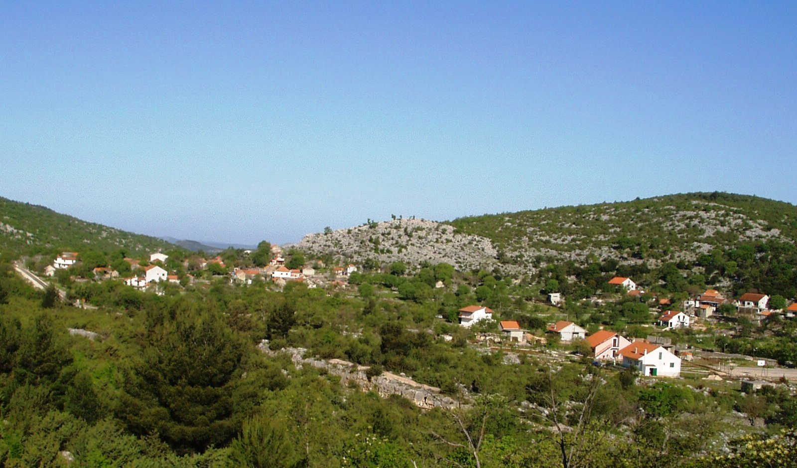 Pogled na selo Perkovići